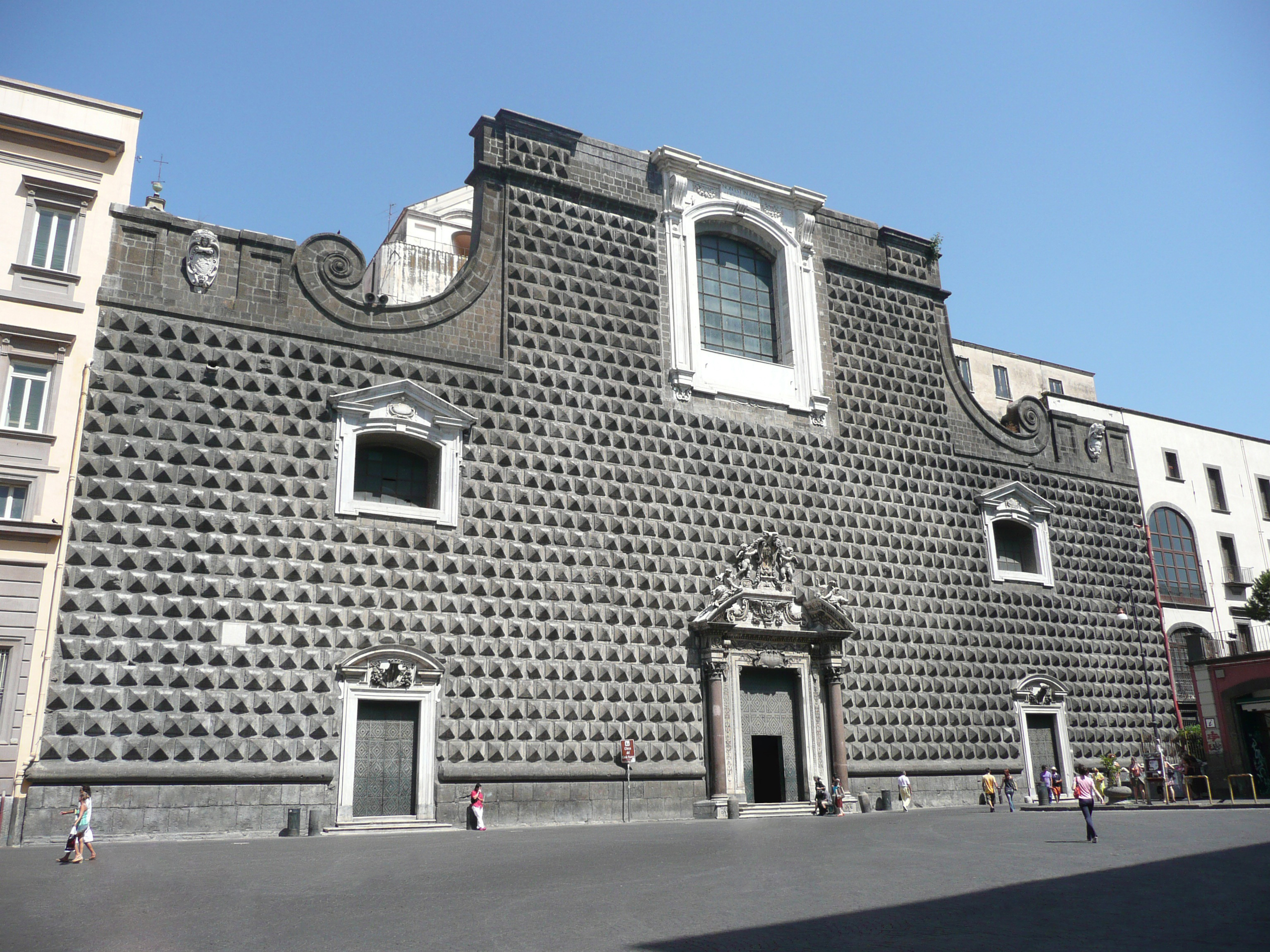 Chiesa del Gesù Nuovo, in Piazza del Gesù, at first sight not very inviting as a church, super facade